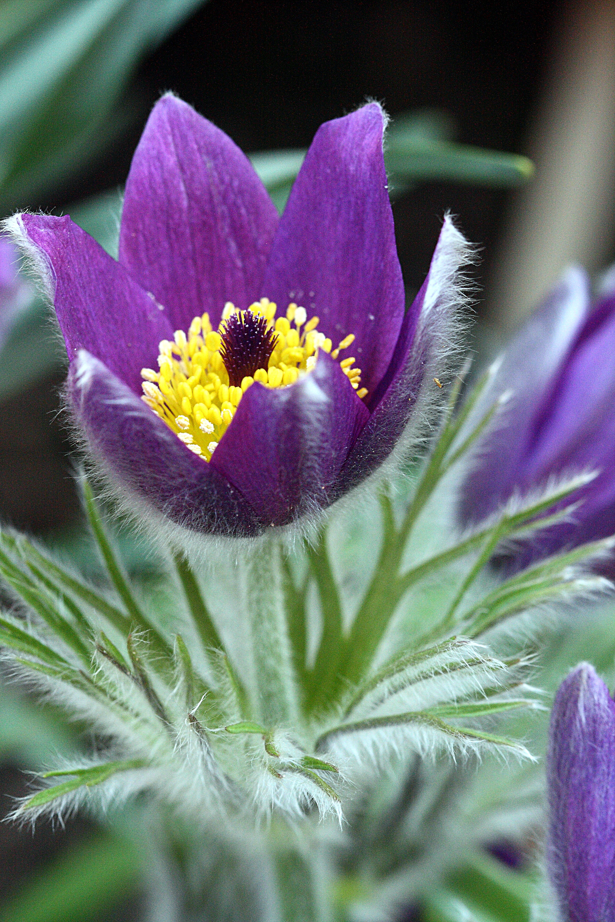 Kuhschelle_(Pulsatilla)